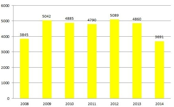 Bezrobocie, Tomaszów Mazowiecki, 2008-2014